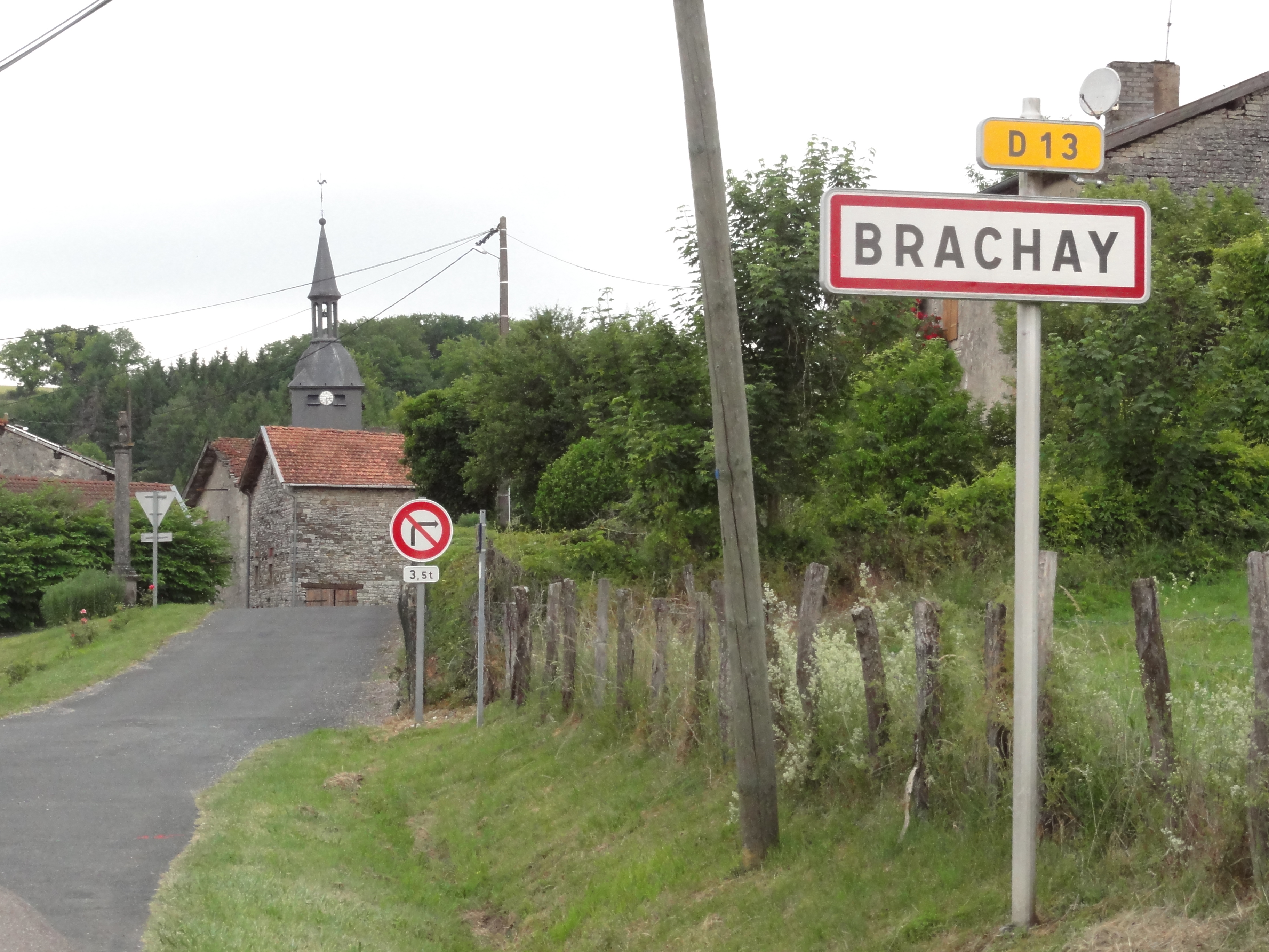 Brachay (Haute-Marne) entrée du village